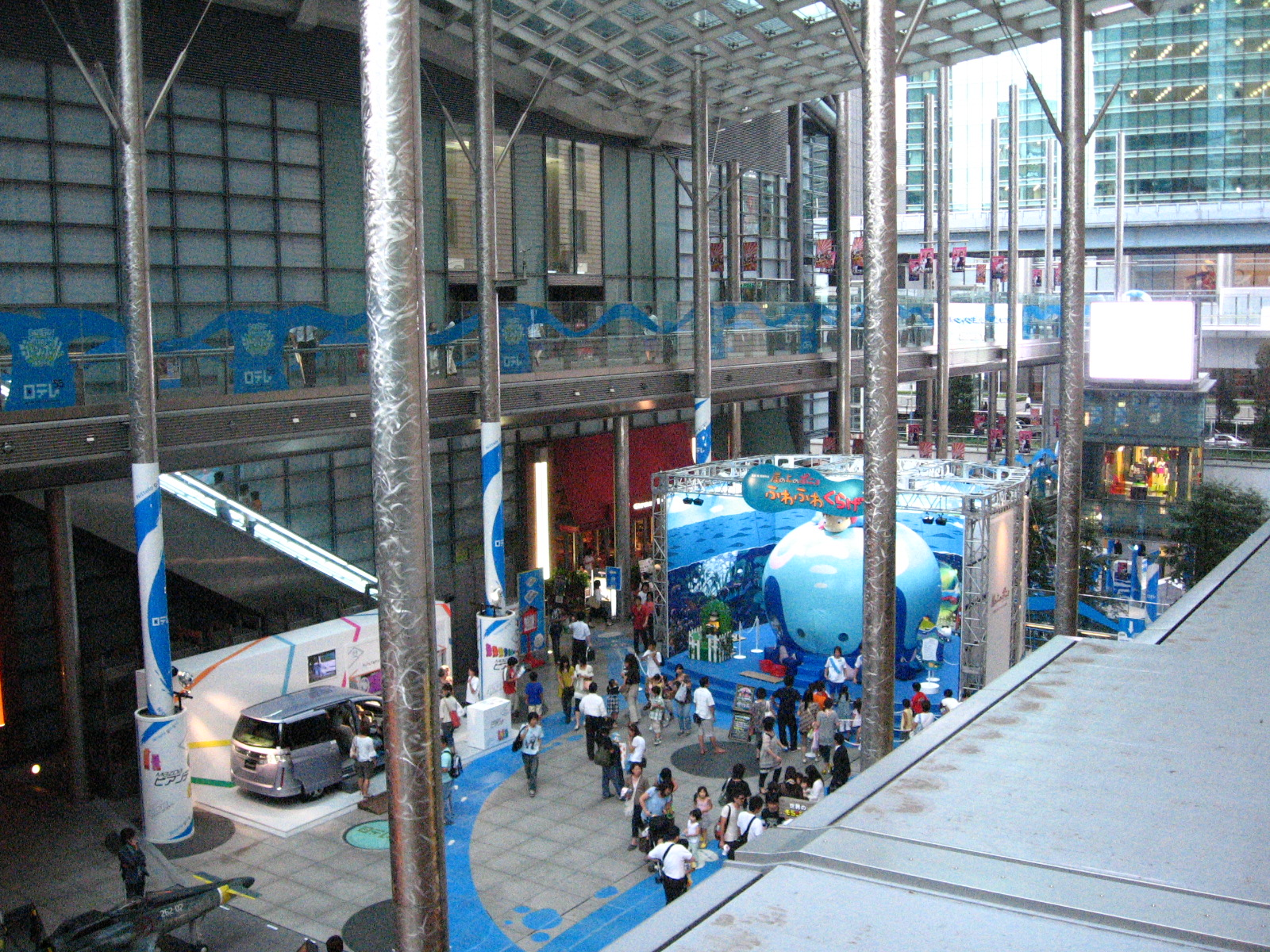 東京・汐留の日本テレビの夏恒例のイベント「GO!GO!SHIODOMEジャンボリー」（現『超☆汐留パラダイス』）。写真は2008年の模様。